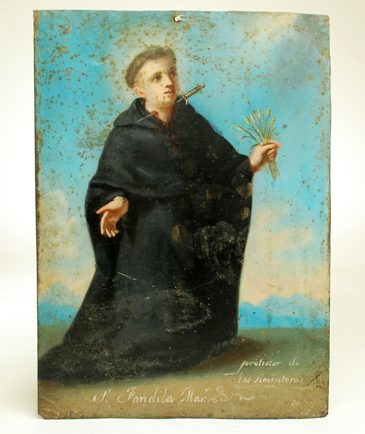 Pintura sobre llauna, ca. 1800-1820, d'autor anònim andalús, amb la representació de Sant Fàndila de Còrdova com a protector de les collites.